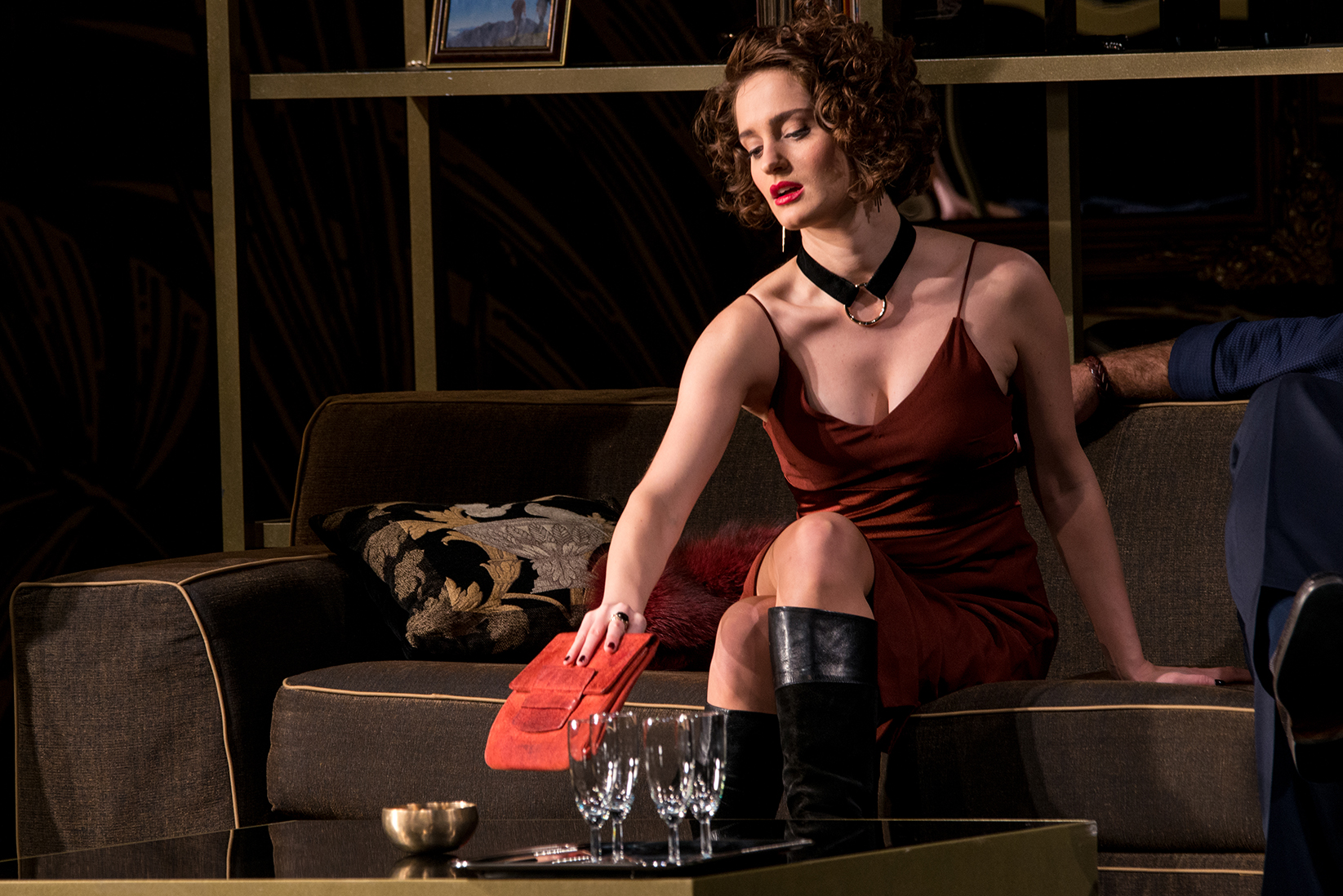 Die Kehrseite der Medaille